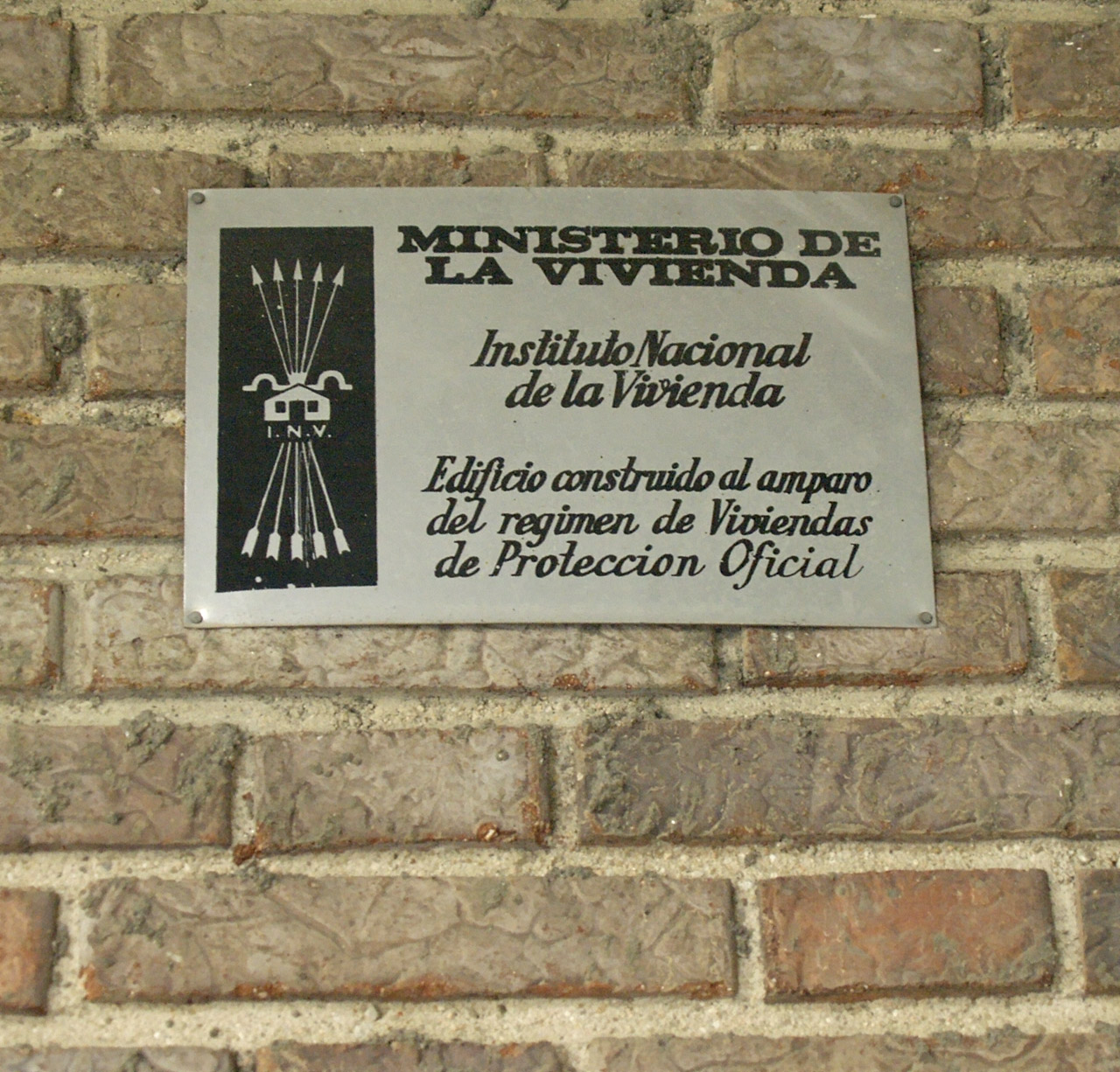 El yugo y las flechas en el portal. Madrid.